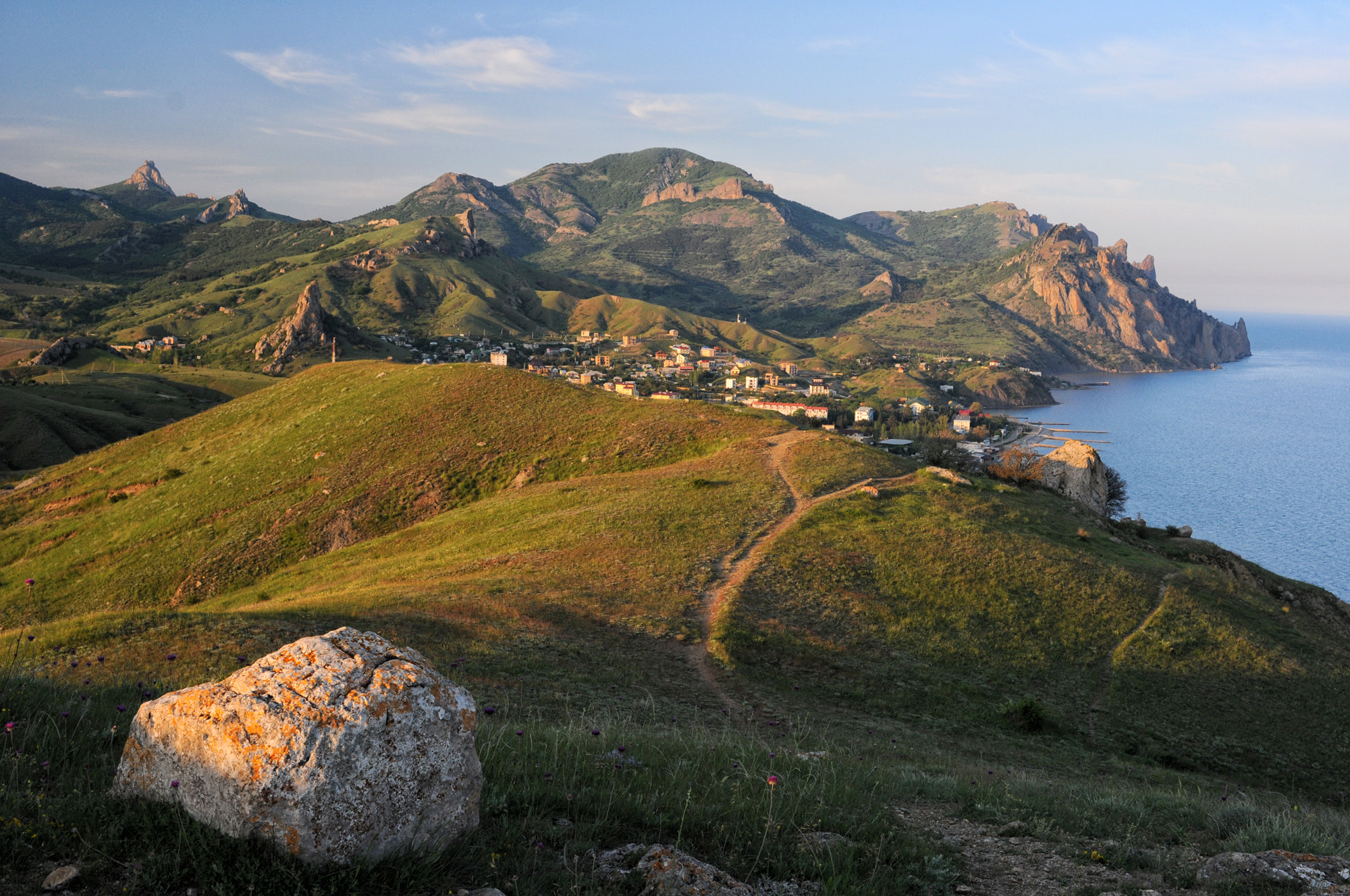 Карадаг з Ечкідагу